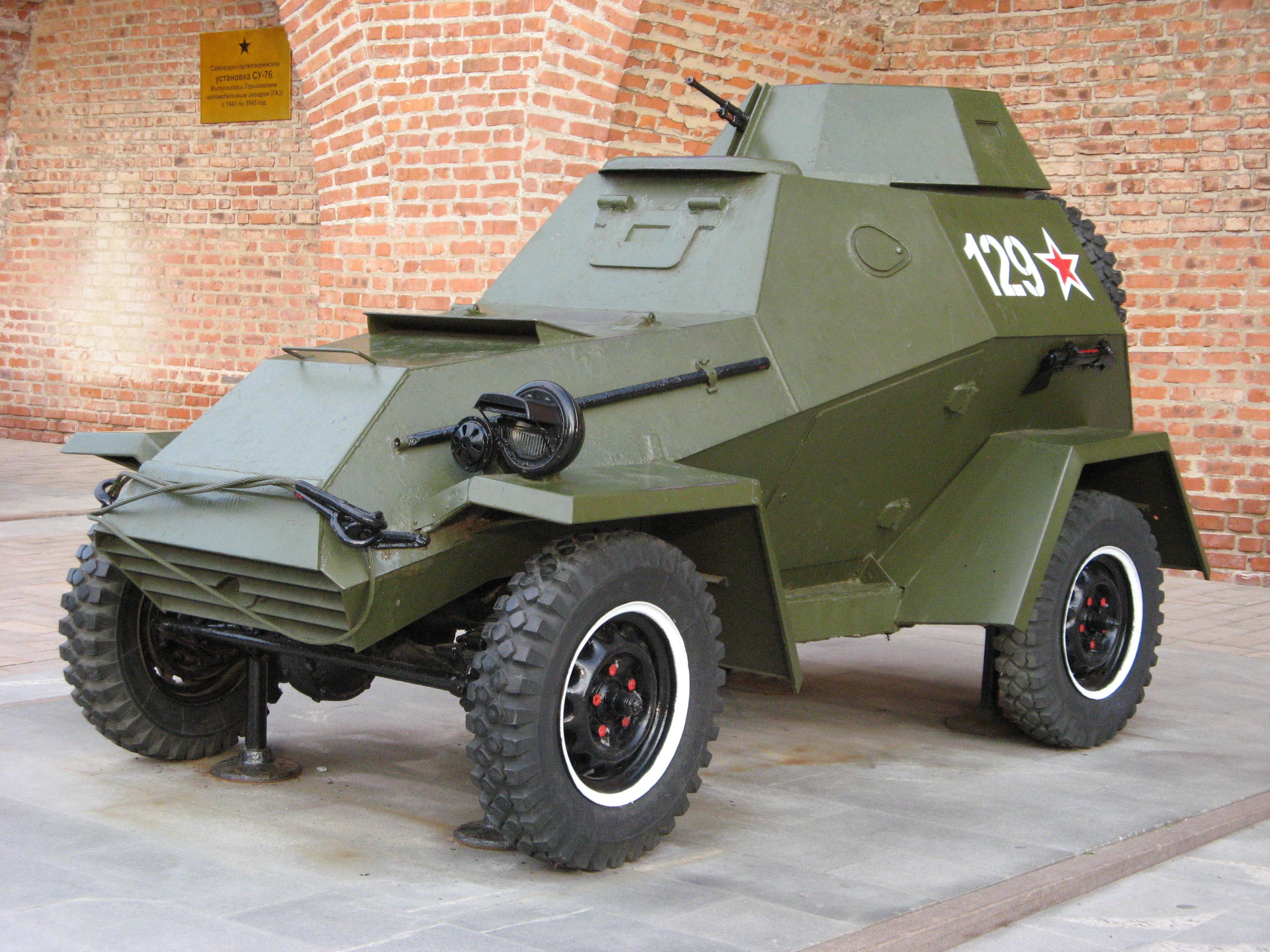 БА-64 в Нижегородском Кремле